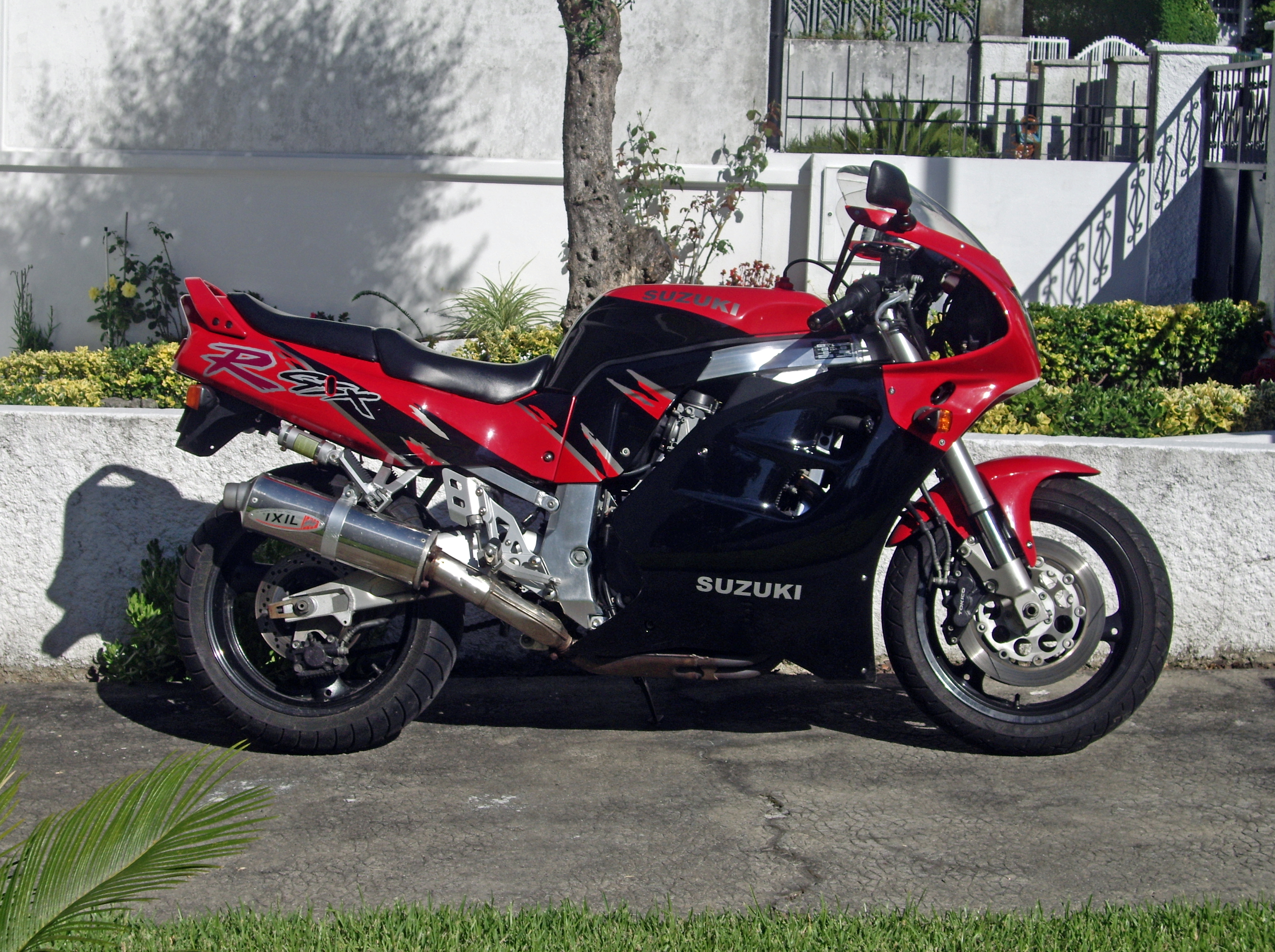 A Suzuki GSX-R 1100W Moto Superdesportiva com aceleração em alta performance de 3,7 segundos dos 0-100 km/h